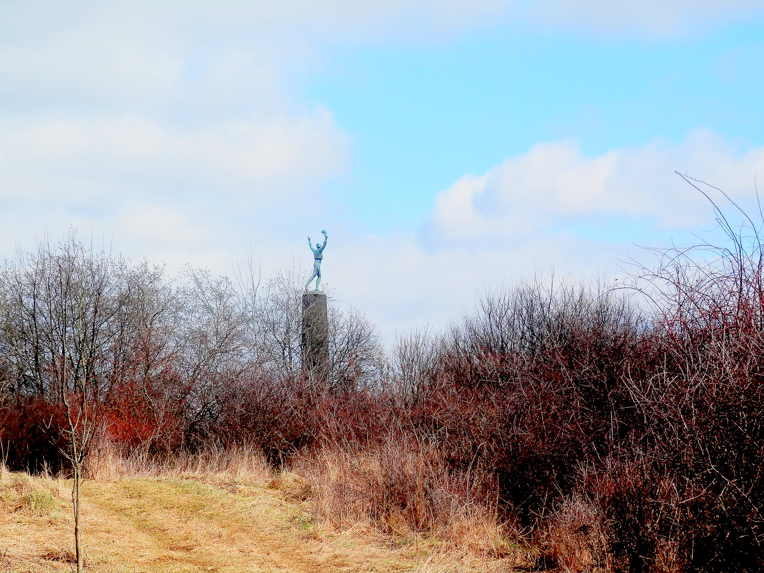 Zalesnený kopec Furča na vrchole, ktorého je Pamätník Východoslovenského roľníckeho povstania. Kataster obce Haniska, okres Prešov. Slovensko.